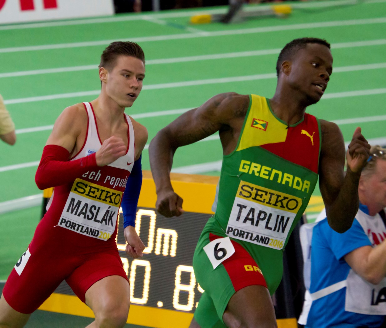 492 finale 400m